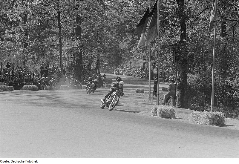 Original image description from the Deutsche Fotothek Motorradfahrer beim 6. Leipziger Stadtparkrennen